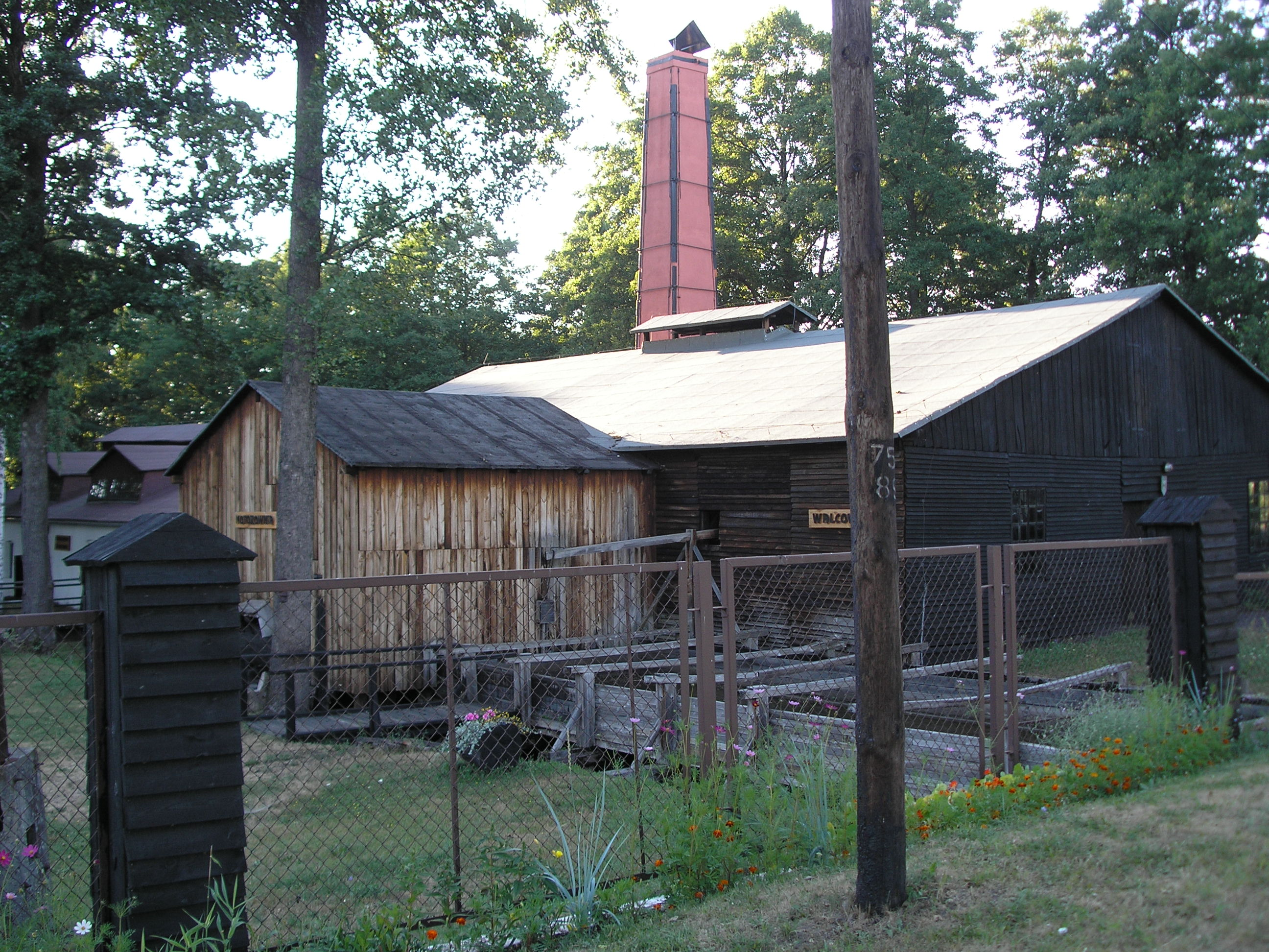 Maleniec. Hala zabytkowej walcowni.